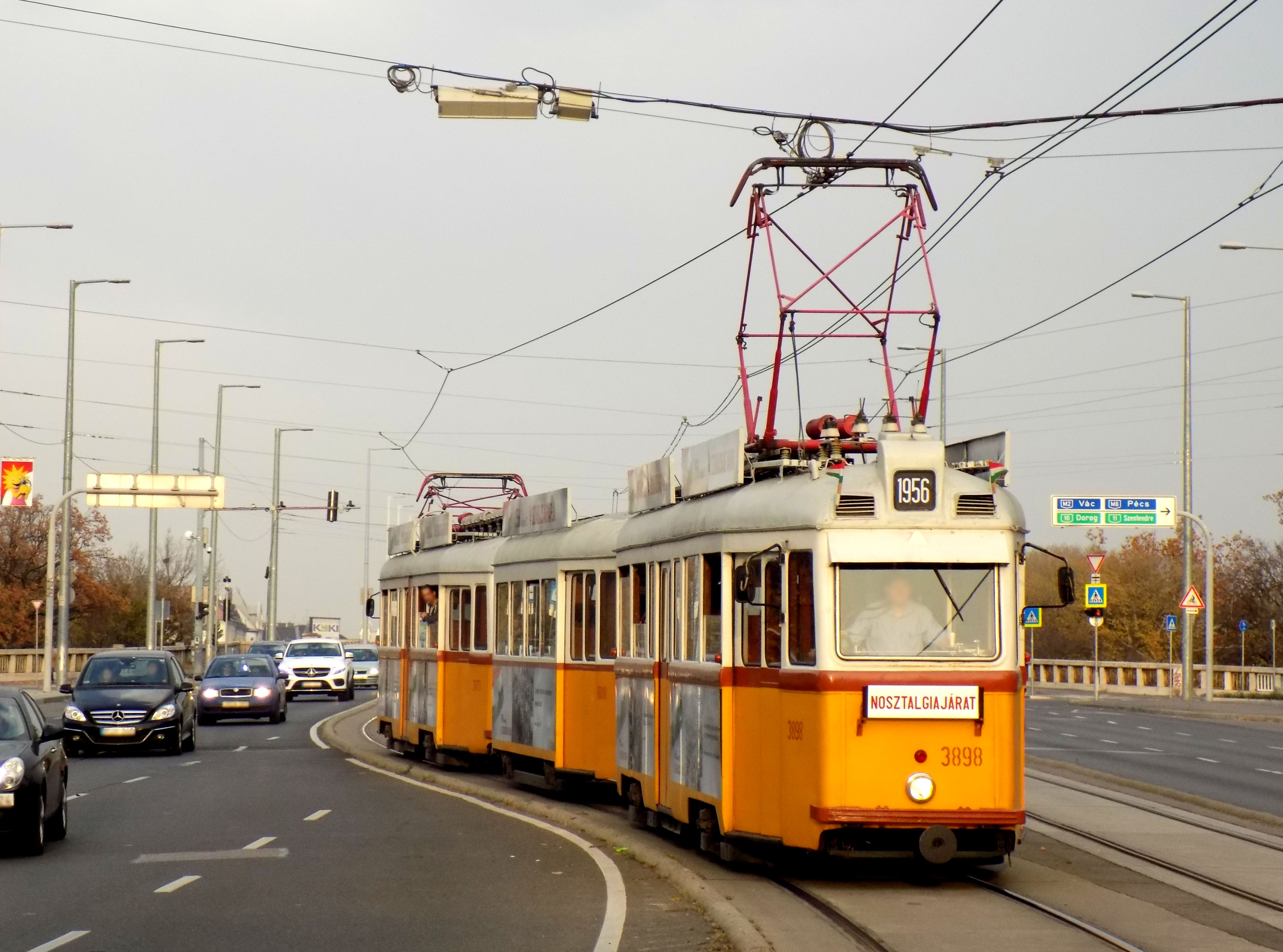 1956-os jelzésű Ganz UV nosztalgiavillamos a Petőfi híd budai hídfőjénél (psz. 3898)